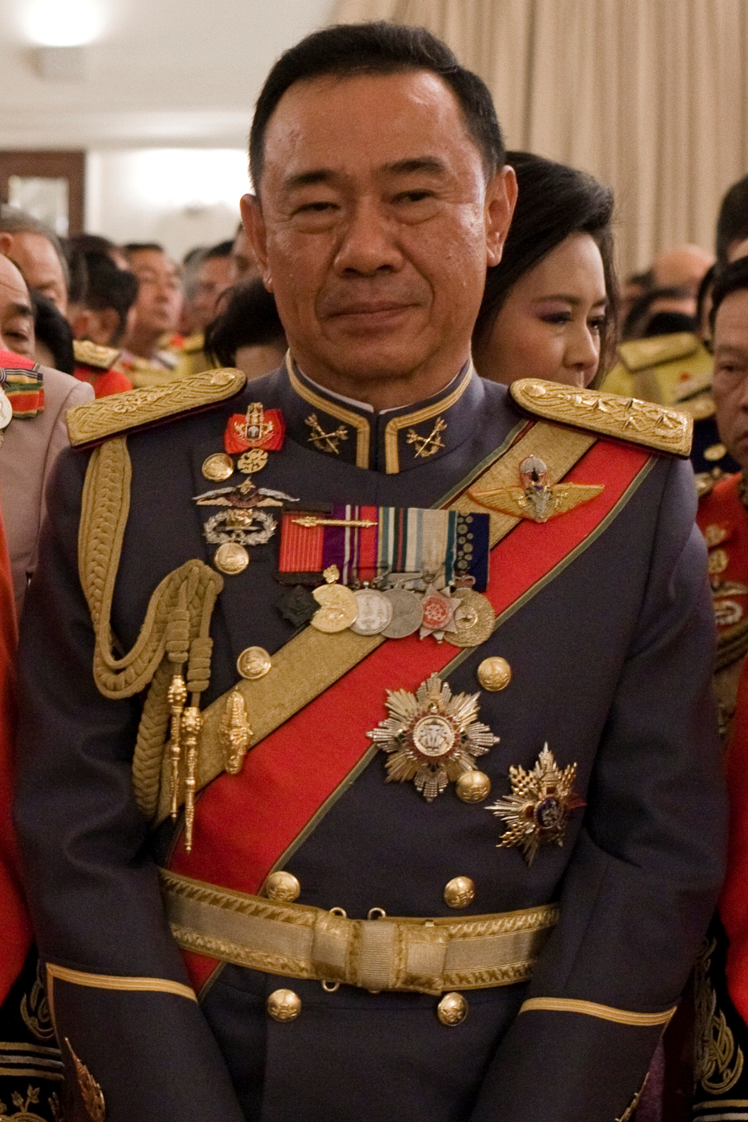 พลเอกทรงกิตติ จักกาบาตร ถ่ายในงานสโมสรสันนิบาตเฉลิมพระเกียรติพระบาทสมเด็จพระเจ้าอยู่หัว ณ ตึกสันติไมตรีหลังนอก ทำเนียบรัฐบาล วันพฤหัสบดีที่ 5 พฤษภาคม พ.ศ. 2554 ครอบตัดจากภาพต้นฉบับ File:นายกรัฐมนตรีและภริยากล่าวถวายพระพรชัยมงคลเนื่องในวันฉั_-_Flickr_-_Abhisit_Vejjajiva_(45).jpg ซึ่งบันนทึกภาพโดย พีรพัฒน์ วิมลรังครัตน์